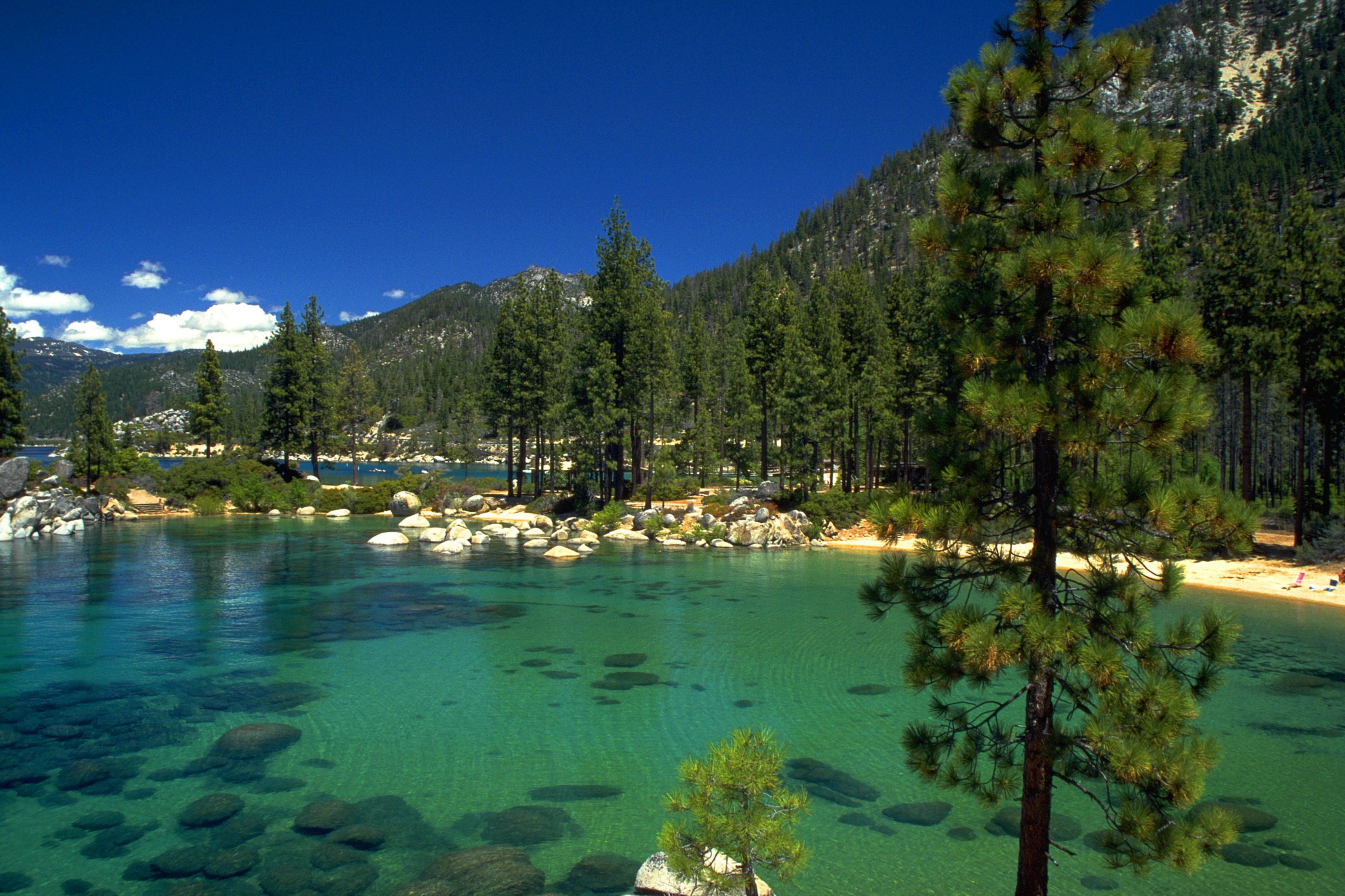 Der über 518km² große und über 490m tiefe Lake Tahoe liegt in 1900 m Höhe in einem alpinen Becken an der Grenze zwischen Kalifornien & Nevada. Baden im Sommer und Skifahren im Winter machen den See zu einem der attraktivsten Seen der USA. In Deutschland ist der See eher durch die Western-Serie "Bonanza" bekannt, die hier zum Teil gedreht wurde. Der im Norden des Sees liegende Ski-Ort Squaw Valley wurde bei uns durch die Winter-Olympiade im Feb. 1960 bekannt. Das Bild zeigt eine öffentliche Badebucht im Nordosten des Sees. Anfahrt: Von San Francisco (Entfernung ca. 320 km) über Sacramento ( Interstate 80) nach Truckee. Fotografiert mit Canon EOS 5, 70-200mm (Stellung 70mm), Stativ, 1/60 Belichtung. Digitalisiert mit Minolta Dimage San Speed F 2800; EBV mit PSP X